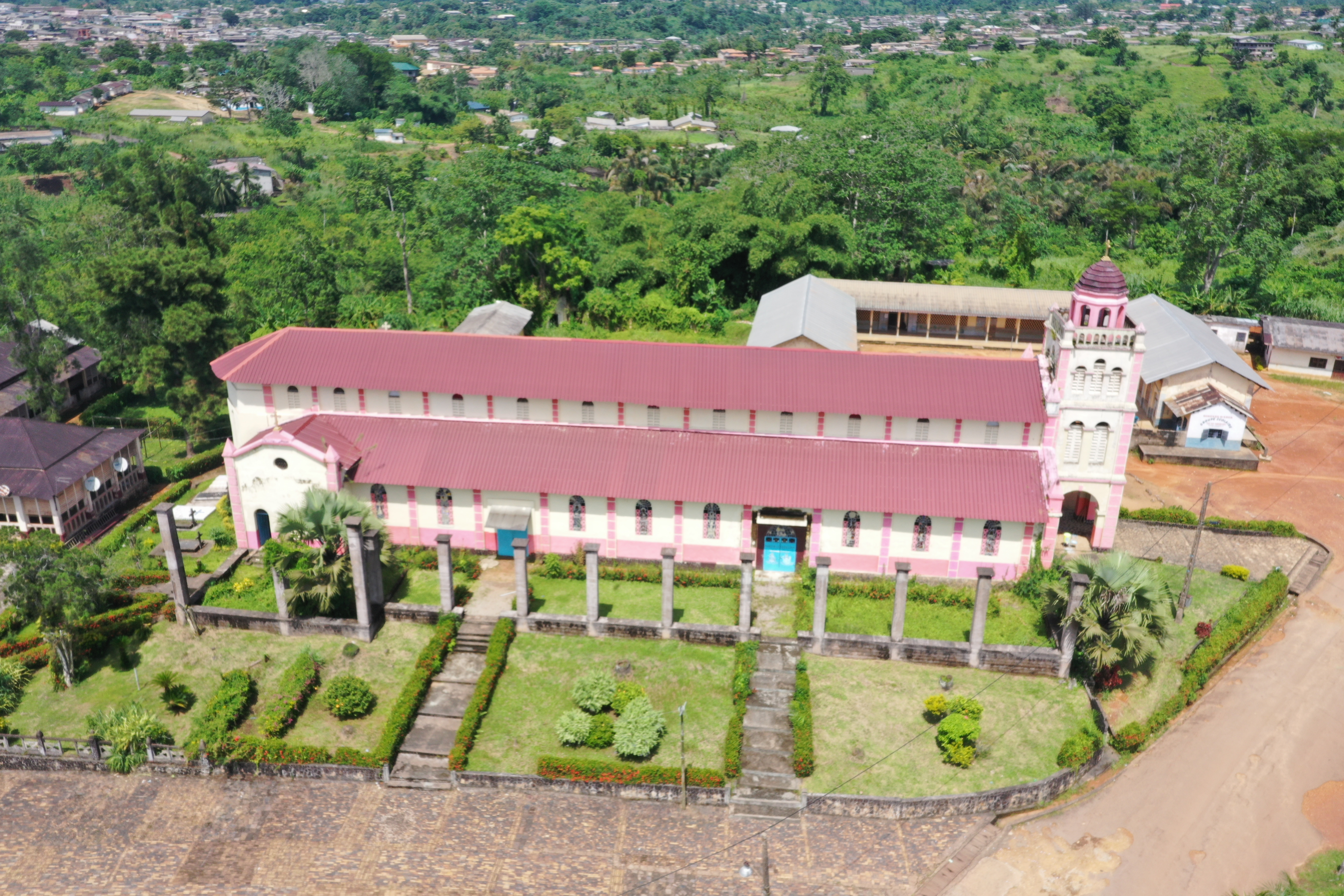 Cathédrale d'edea dans la Sanaga Maritime